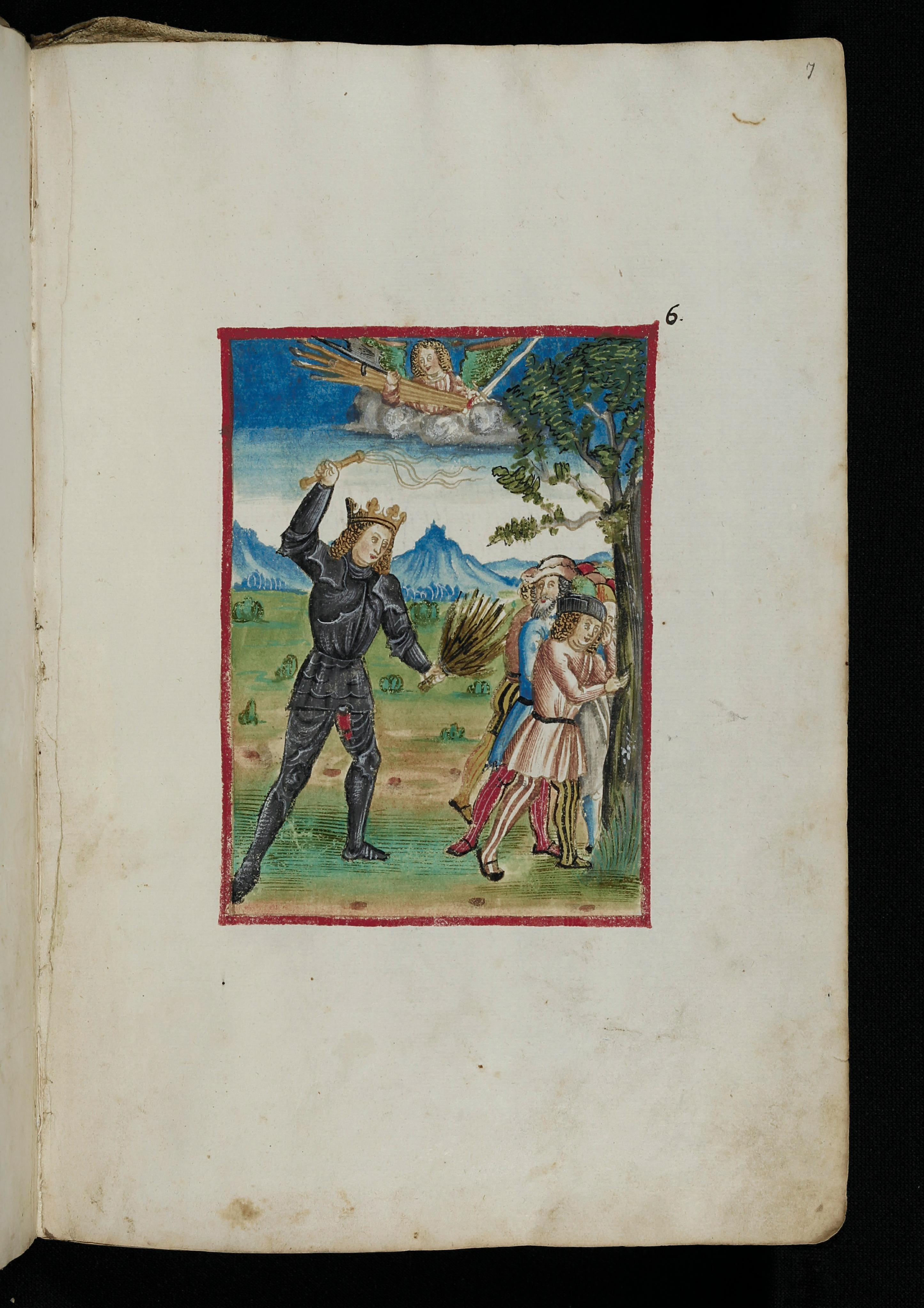 Illustration aus der einzigen bekannten Handschrift von Joseph Grünpecks "De reformatione ecclesiae"